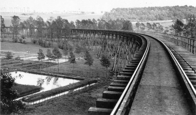 Viaduct van de Stoomtramlijn Maastricht-Vaals nabij de forellenkwekerij in Gulpen. Fotocollectie RHCL Maastricht, GAM 33505.